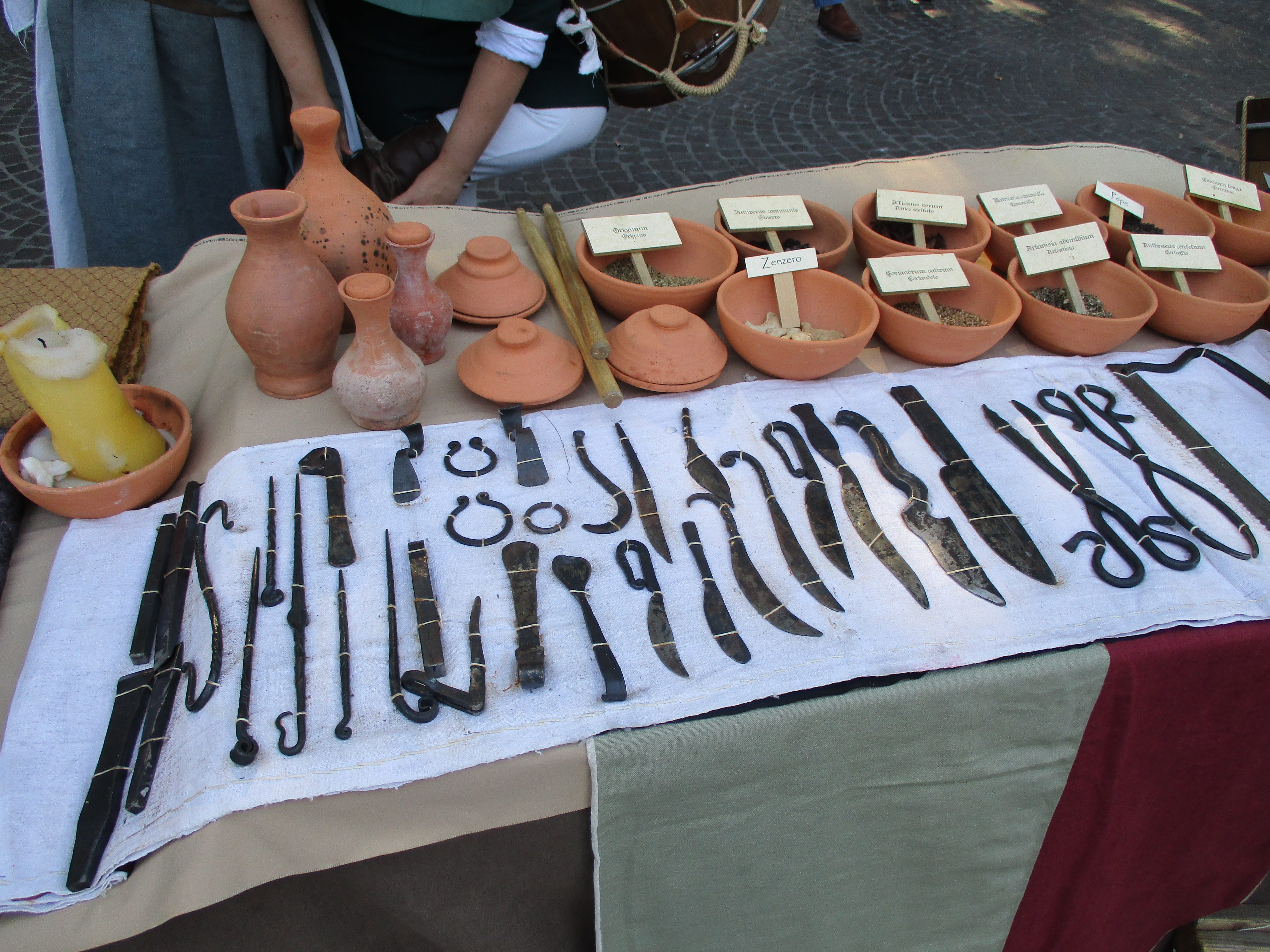 Utensili e spezie antiche della Marsica